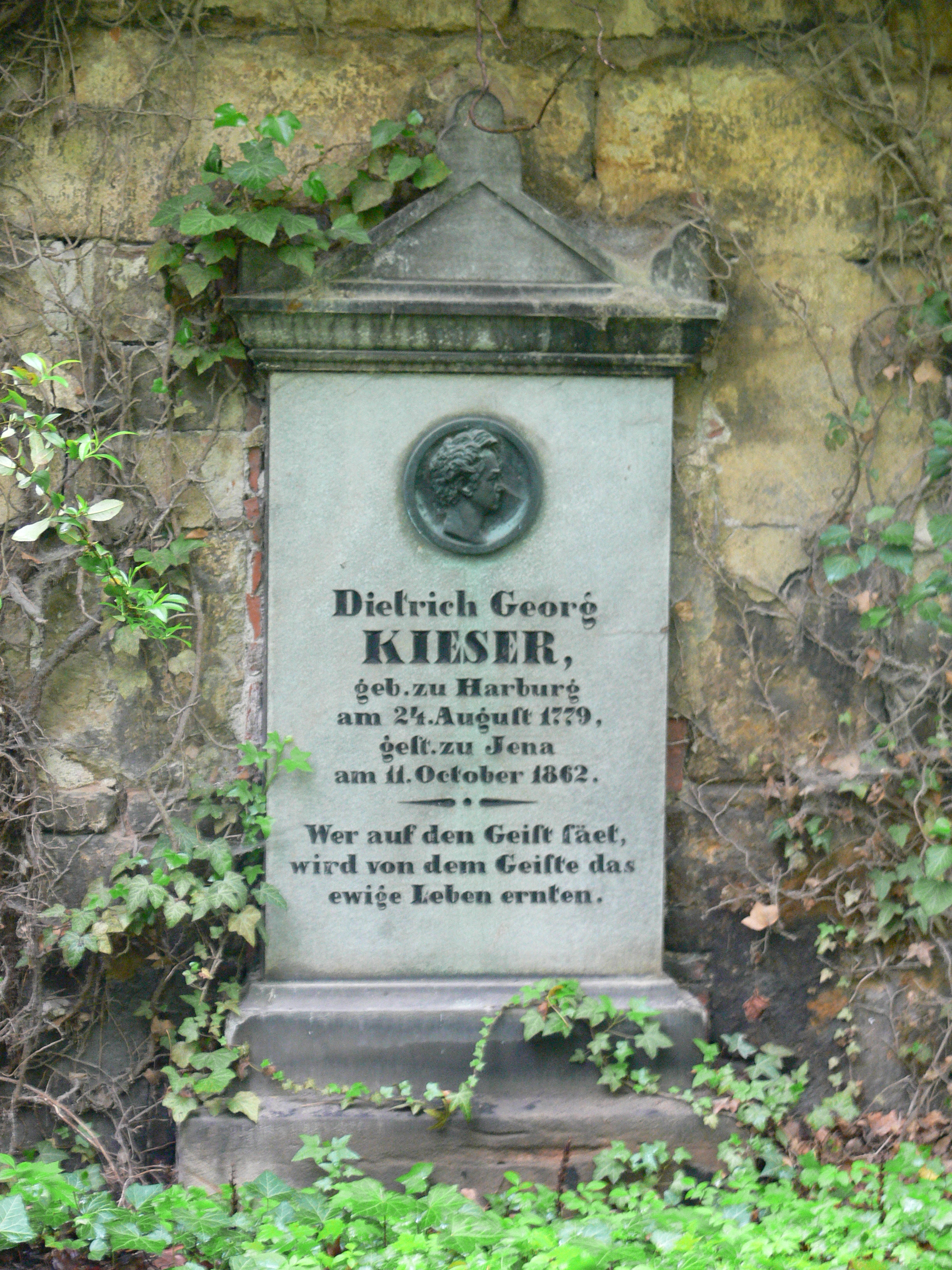 Jena, Johannisfriedhof Grabmal Dietrich Georg Kieser (1779-1862)